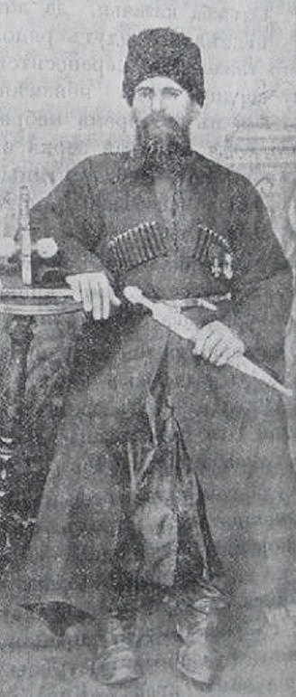 Сергей Севастьянов (участник Баязетского сидения 1877 г.)